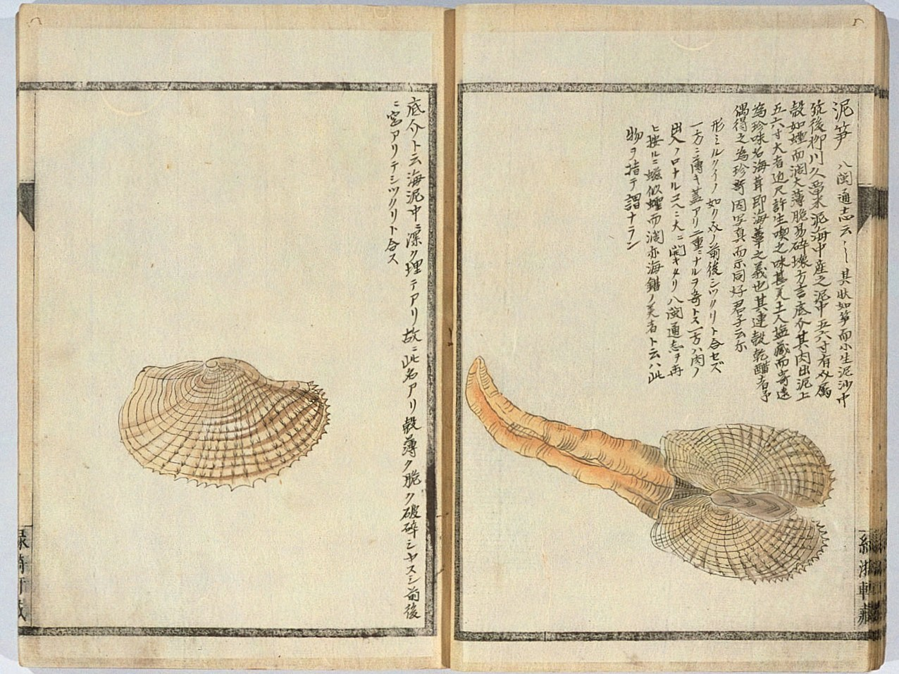 『千蟲譜』に出ているウミタケ "Umitake" (Barnea dilatata / B. dilatata japonica / B. japonica) figured in Sen-Chū-Fu vol. 1 (T. Kurimoto, 1811)